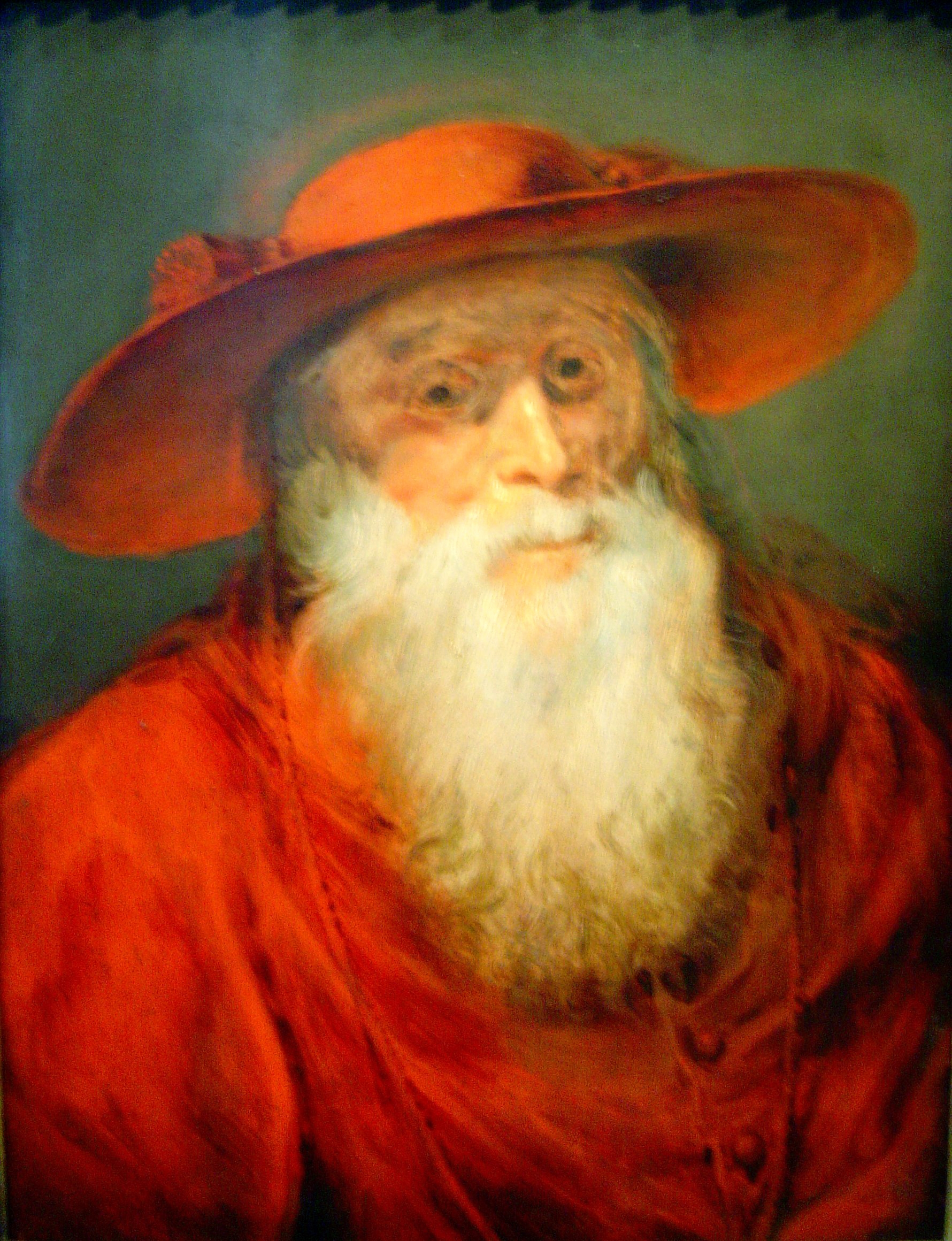 Den hellegen Hieronimus gemolt vum Peter Paul Rubens.